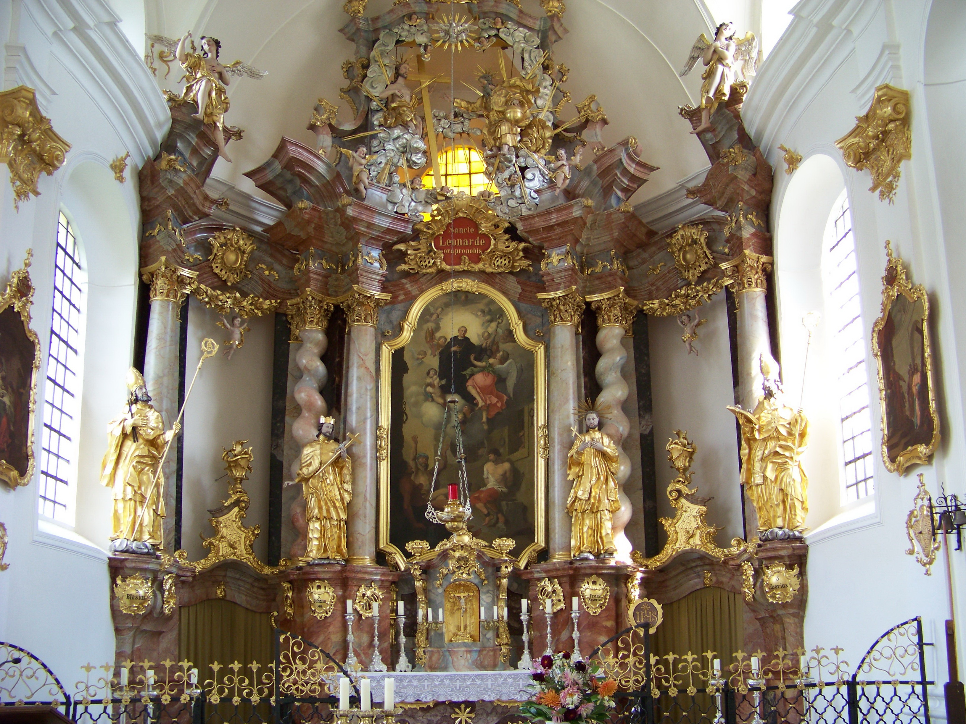 Rottenburg an der Laaber. Oberotterbach, Leonhardistraße 12. Wallfahrtskirche St. Leonhard. Eingezogener Chor mit Halbkreisschluss. Tonnengewölbe mit Stichkappen. Umlaufendes, kräftiges Kranzgesims. Hochaltar mit sechs Säulen, von denen zwei gewunden sind.